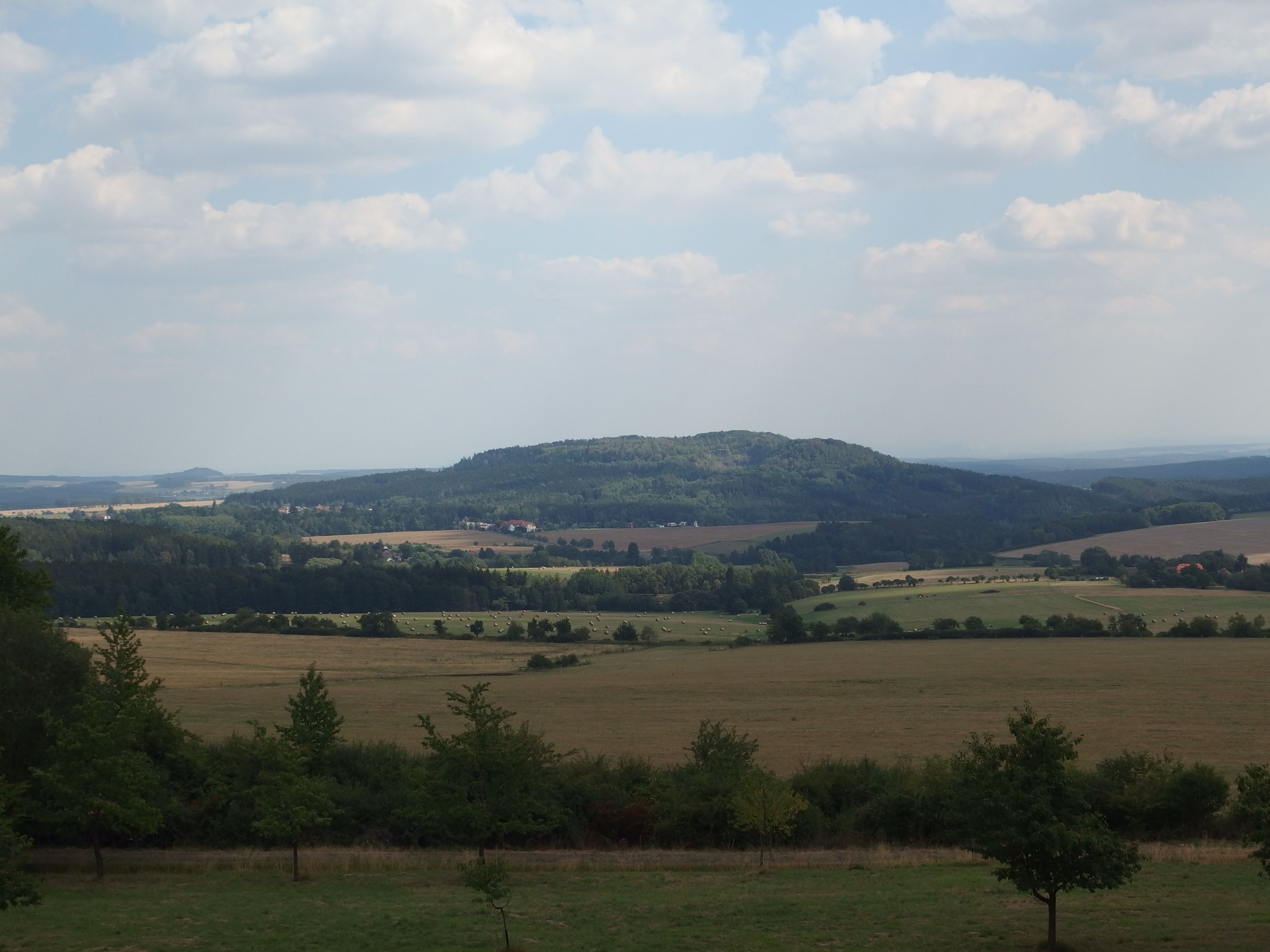 Pohled na Hradišťský kopec z Ovčího vrchu